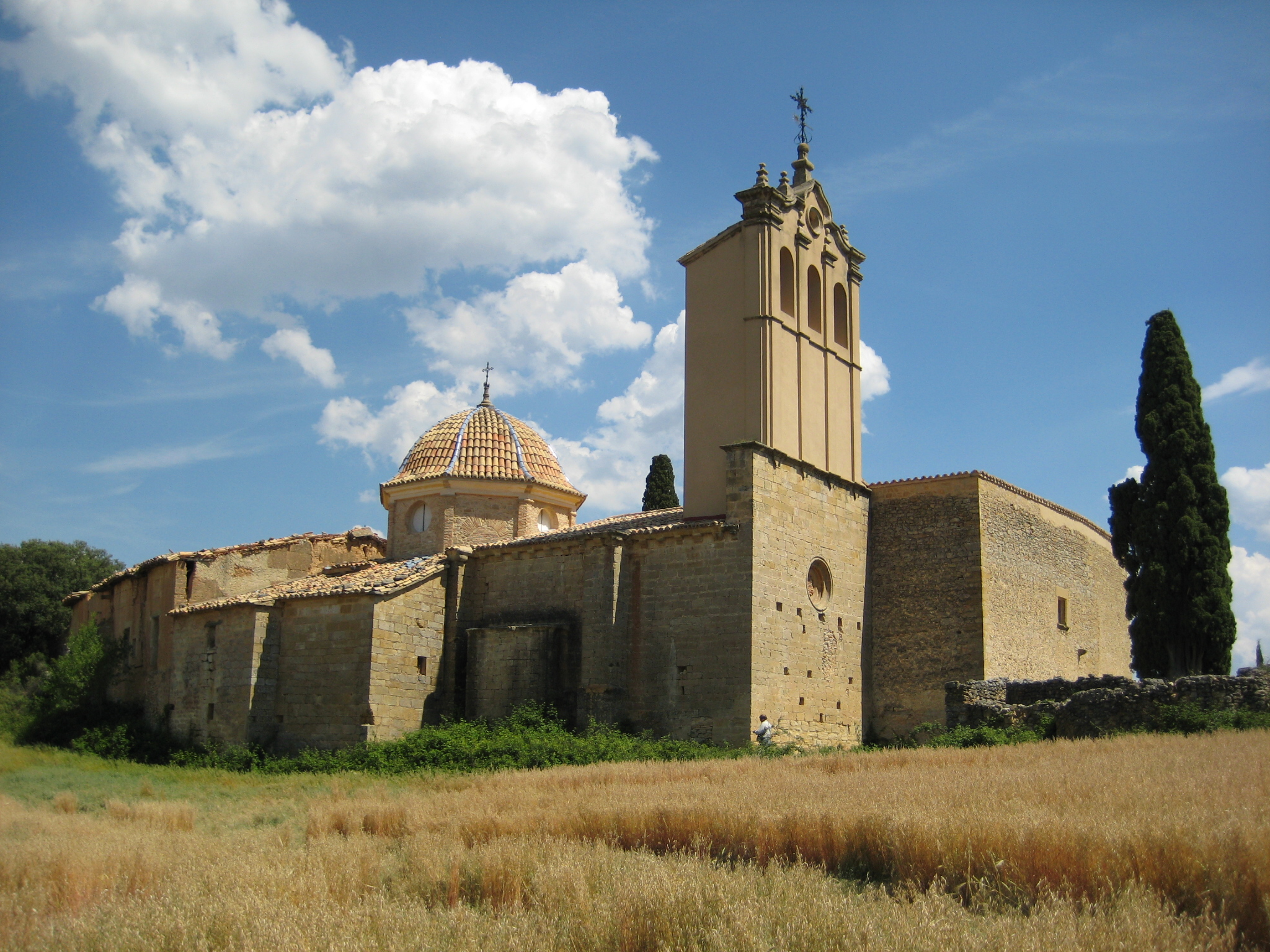 Se trata de un santuario fundado en el s.XI y formado por varias edificaciones de etapas constructivas distintas. En primer lugar, destaca la ermita de Santa Mónica, una construcción del s.XV totalmente transformada en el s.XVII, de la que aún se conserva la portada gótica abierta en el muro meridional. Consta de nave única de tres tramos: en el primero se sitúa el amplio presbiterio, en el segundo se abre el acceso gótico y en el tercero se localiza un coro alto. El presbiterio aparece cubierto por una gran cúpula sobre pechinas y cuenta con una capilla lateral en el lado del Evangelio y un gran portón en el de la Epístola, que se utiliza durante determinadas celebraciones, cuando se congregan un gran número de peregrinos. Adosada al testero de la ermita aparece la casa del mediero y, cerrando el conjunto, un pequeño patio porticado, abierto en su piso inferior por medio de grandes arcadas de medio punto, que aloja en su planta superior la hospedería de peregrinos. Al exterior forma un volumen compacto de planta irregular, en el que sobresale la elevada espadaña de tres vanos y remate mixtilíneo. Todo el conjunto se encuentra rodeado por un bello paisaje de cipreses.